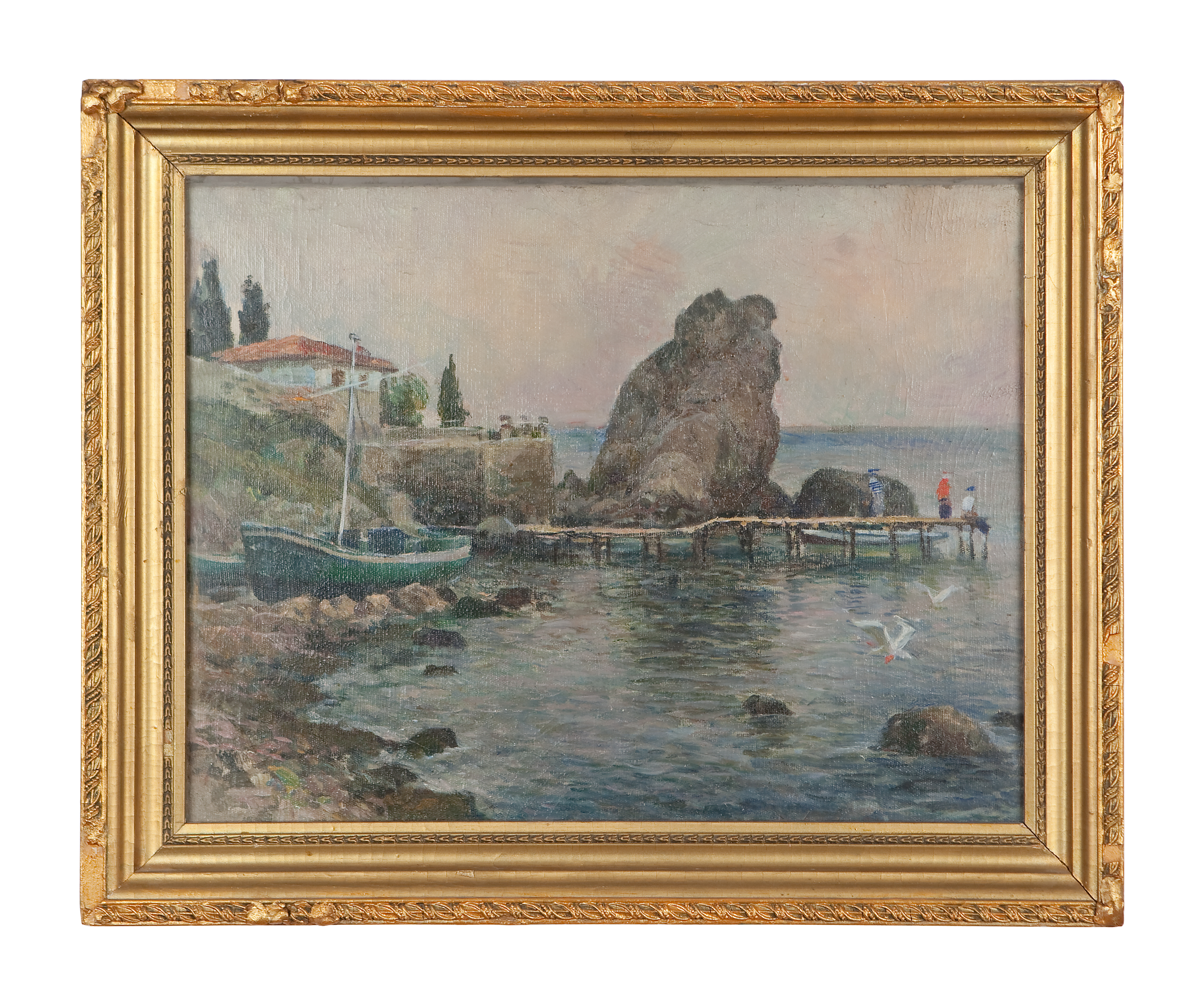 Пейзаж Виды Гурзуфа.Год создания 1958 выполненный маслом на холсте